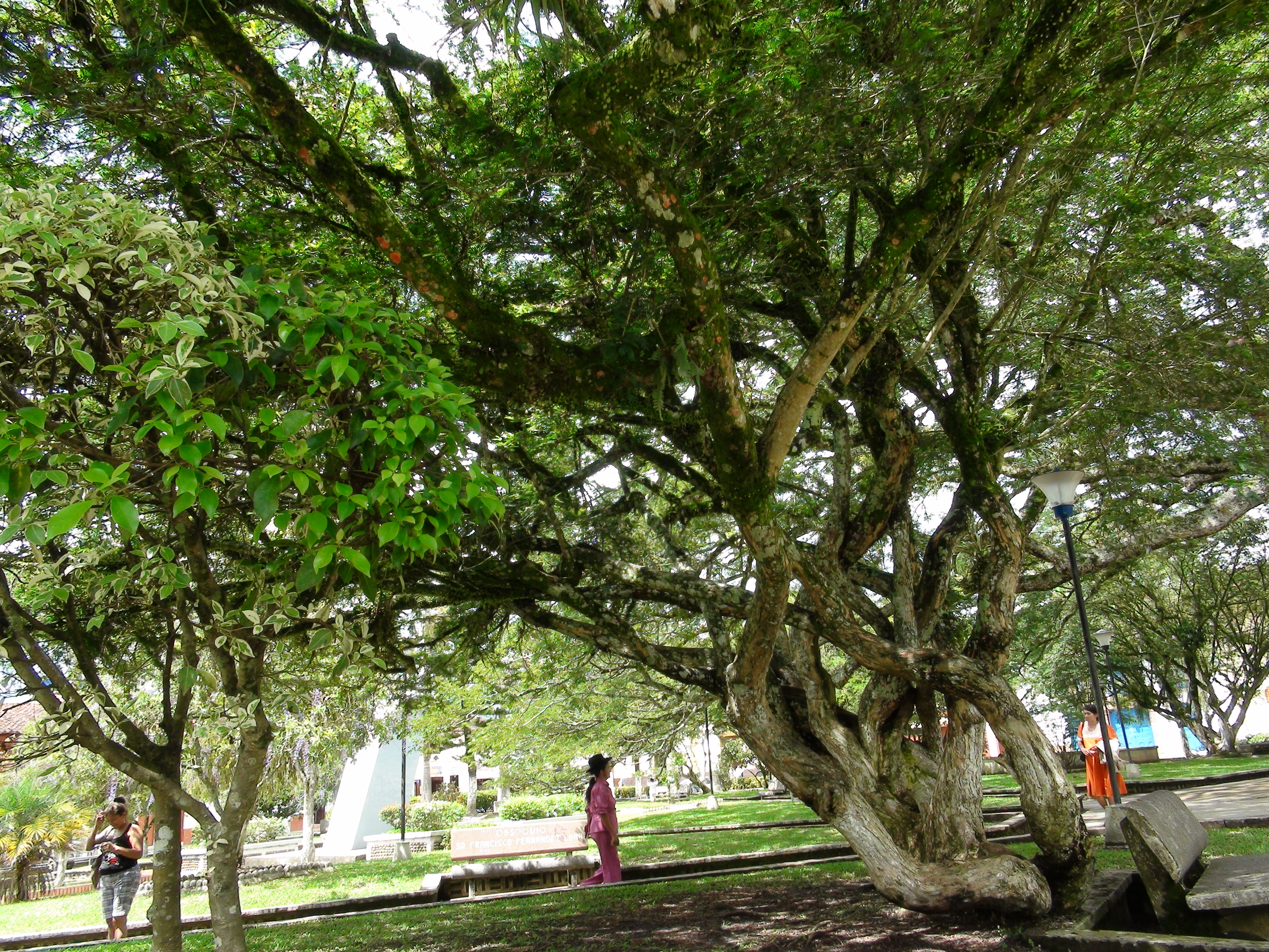 El Samán, sembrado en el año 1910 tiene brazos sabios.